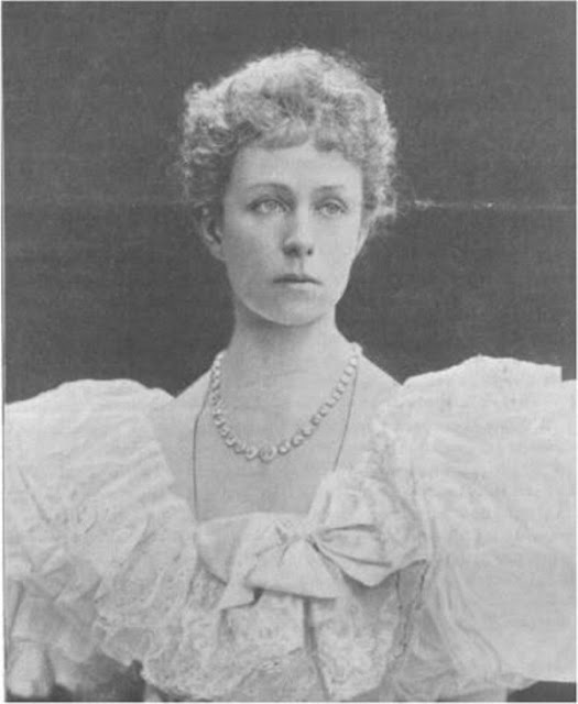 Maria Teresa di Borbone-Due Sicilie (1867-1909), nipote di Ferdinando II delle Due Sicilie